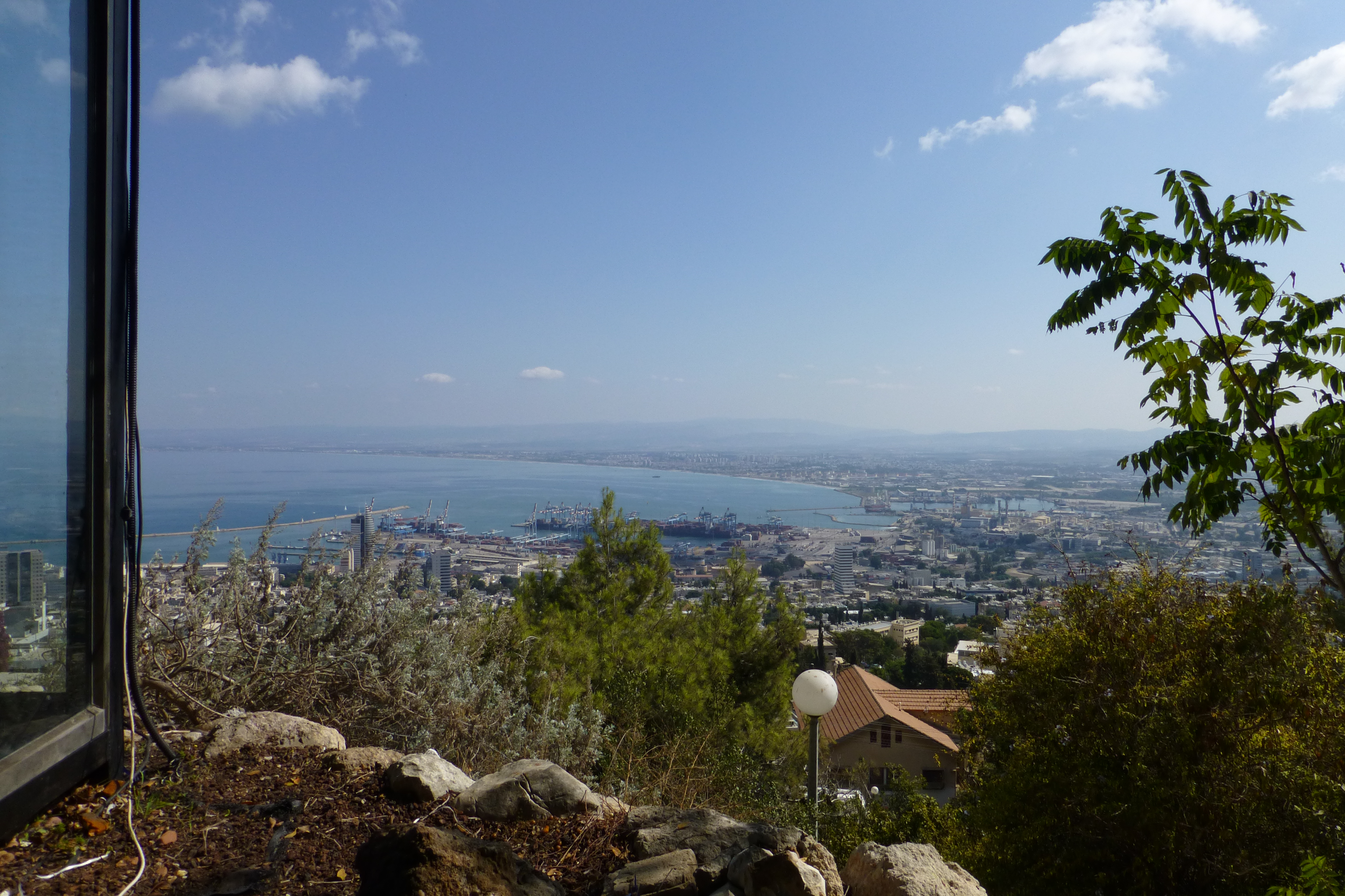 גן אלנבי - רח' יפה נוף 120, מרכז הכרמל, חיפה